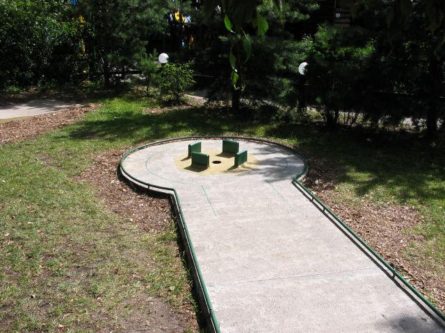 Stanowisko do gry w minigolfa.